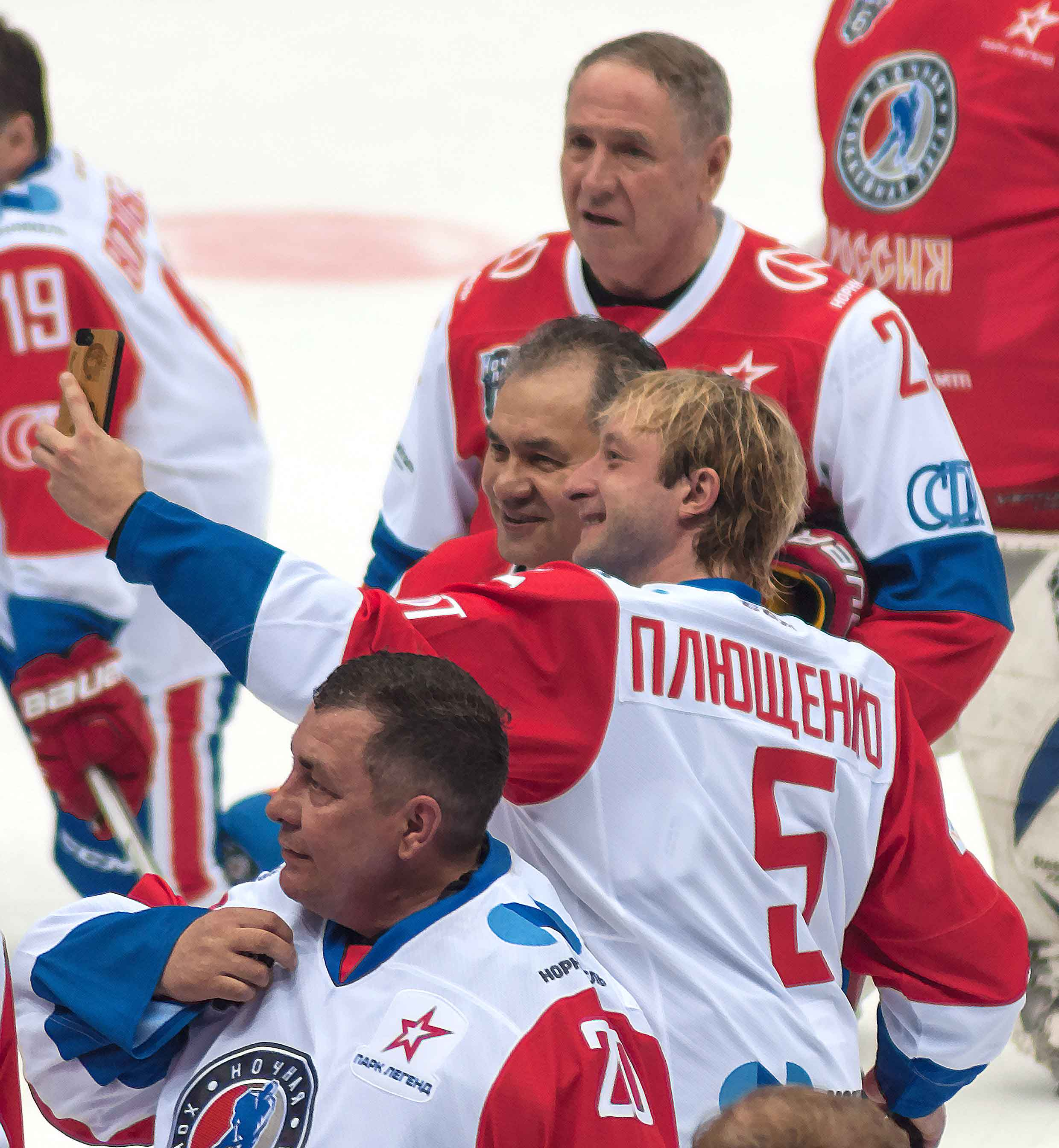 Гала-матч Ночной Хоккейной Лиги часть 2